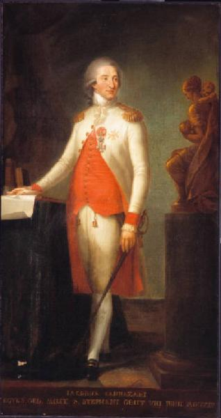 Paolo Borroni, Ritratto di Giacomo Sannazzari della Ripa, 1805